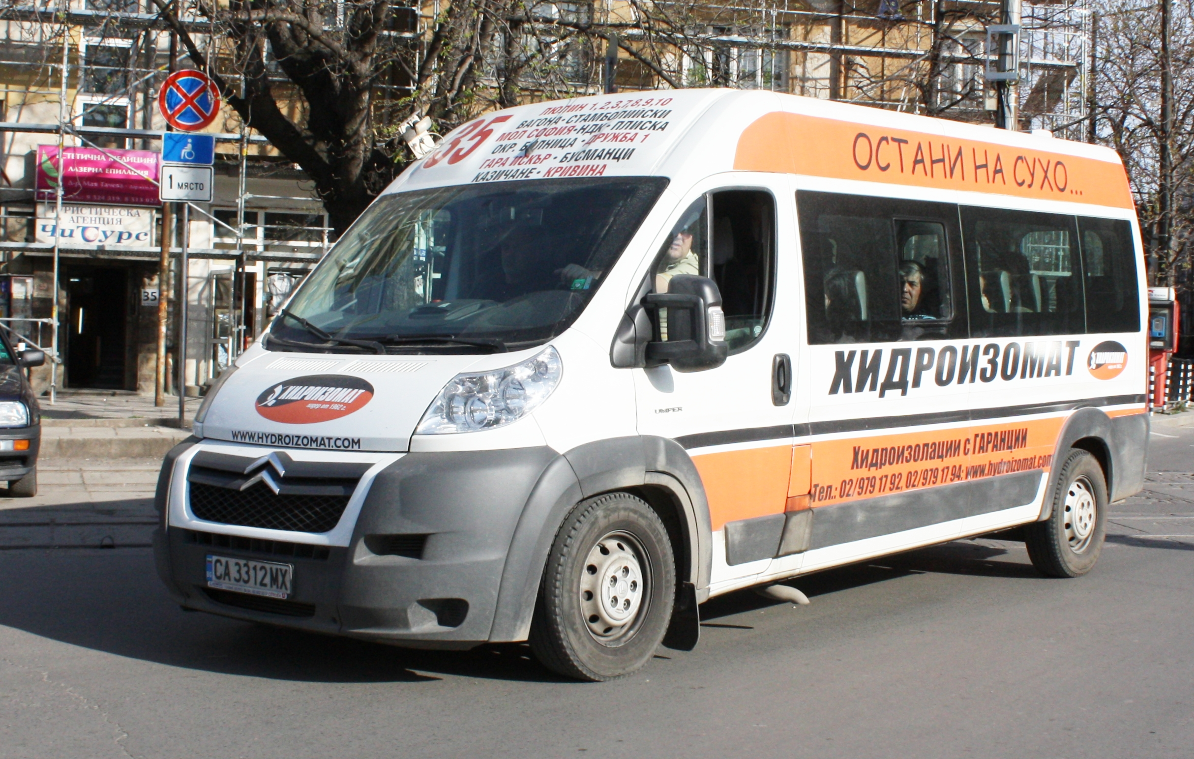 Linientaxi, in Sofia